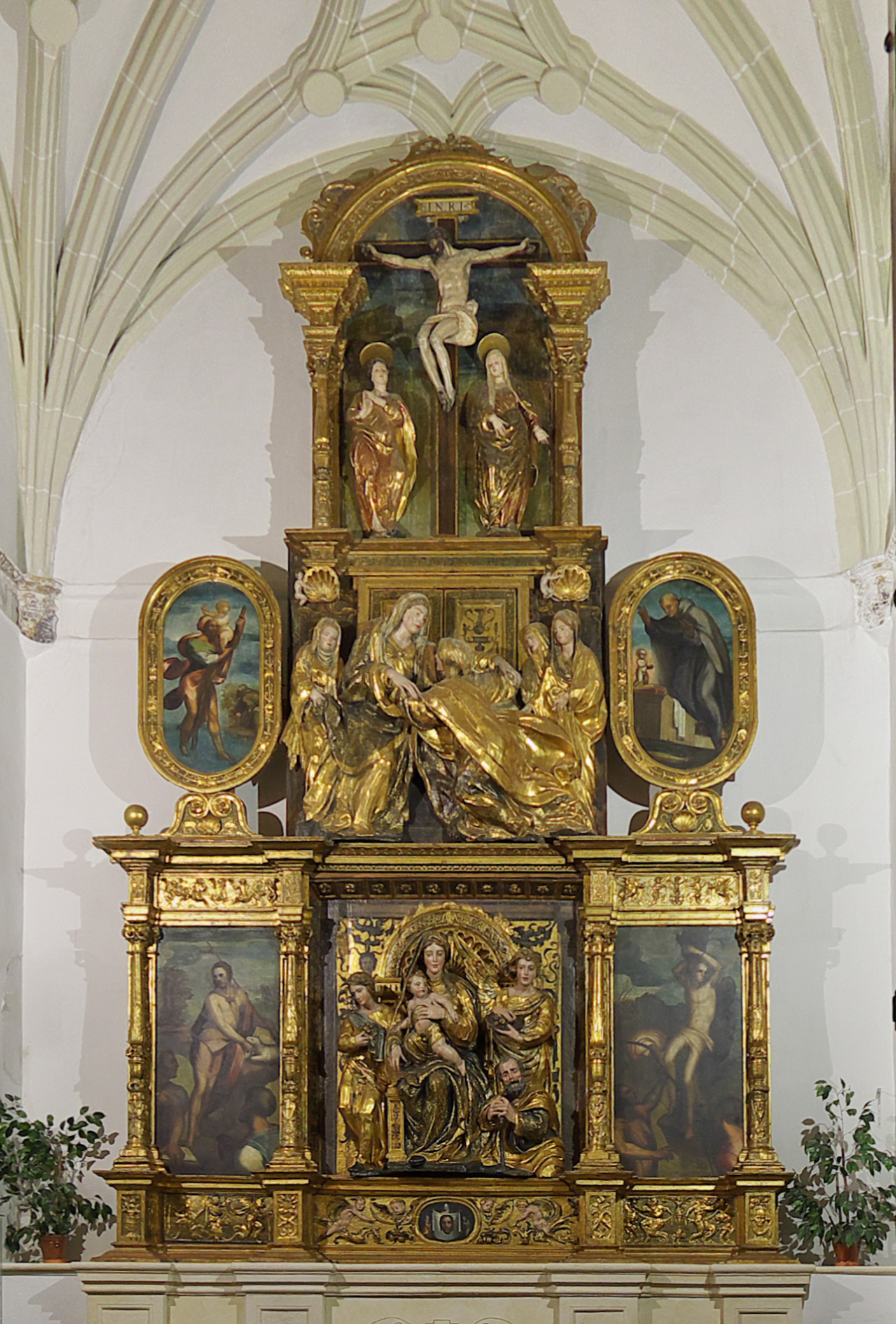 Retablo de la Visitación (1546). La capilla funeraria presenta un magnífico retablo de Alonso de Berruguete